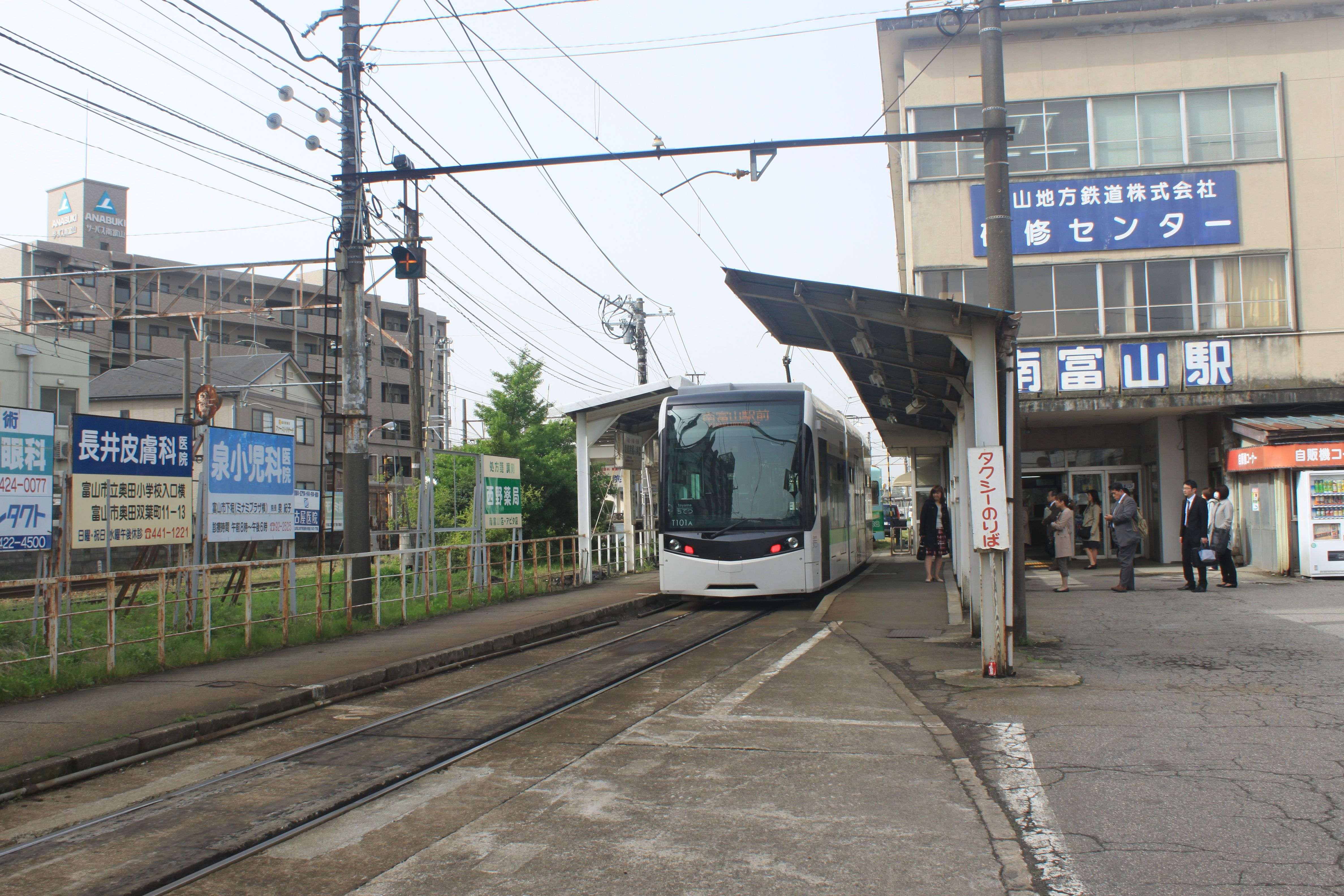 南富山駅前電停